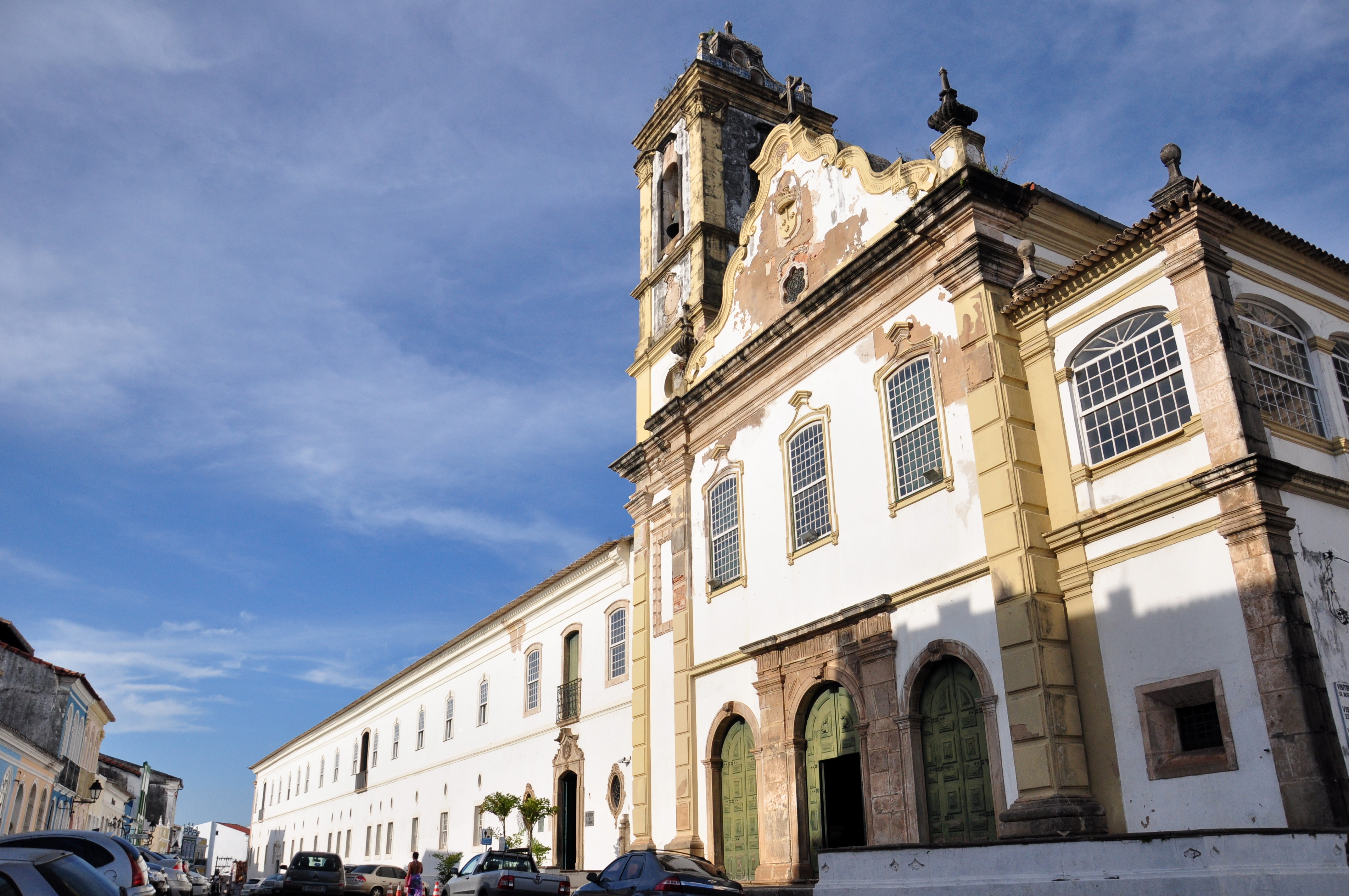 Igreja e Convento do Carmo - Foto :Tereza Torres